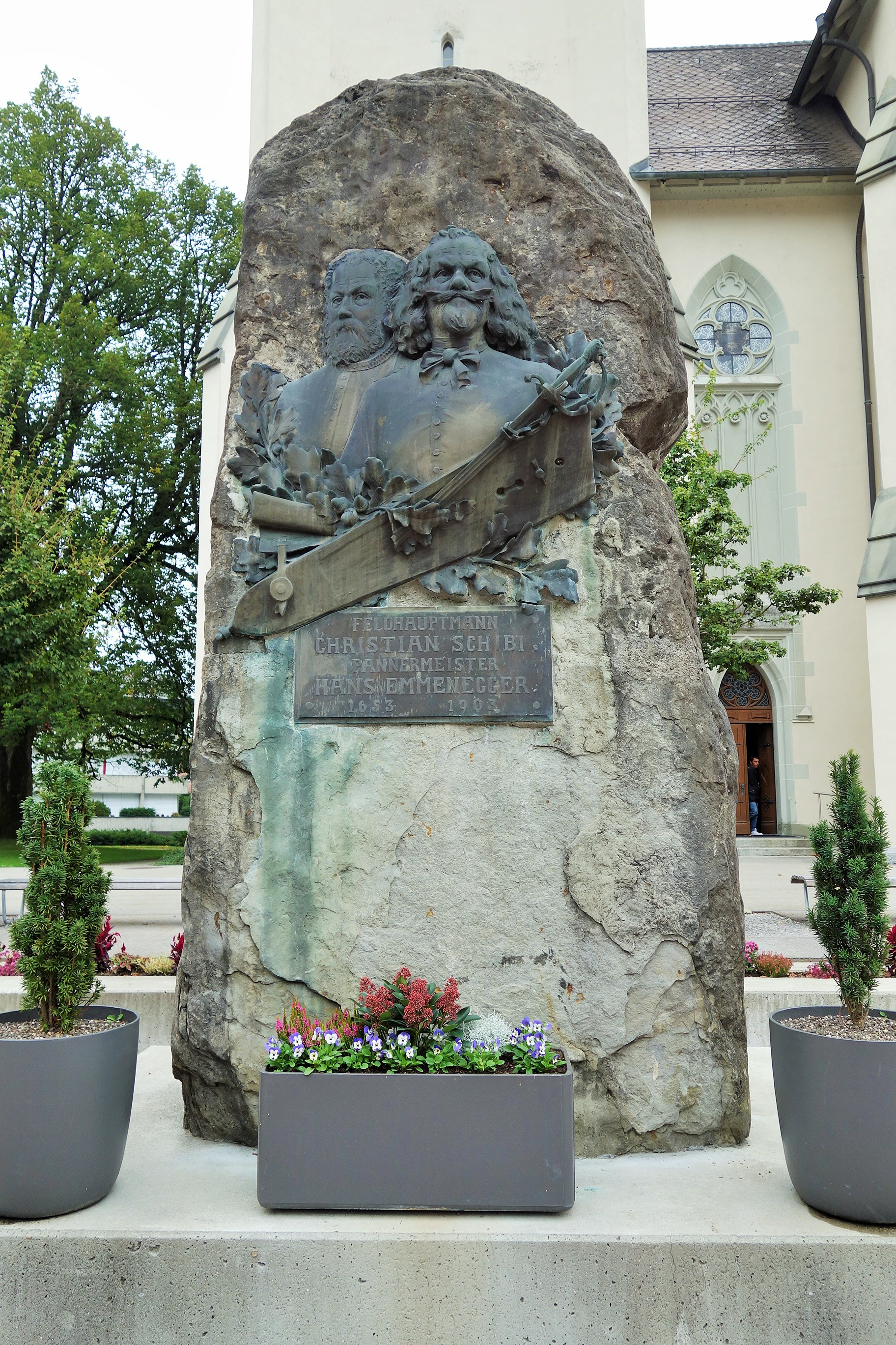 Bronzerelief für Christian Schybi und Hans Emmenegger am Schybistein in Escholzmatt. Geschaffen von Paul Irenä Amlehn (1867–1931) Bildhauer.Kulturgüter Escholzmatt LU, Schweiz